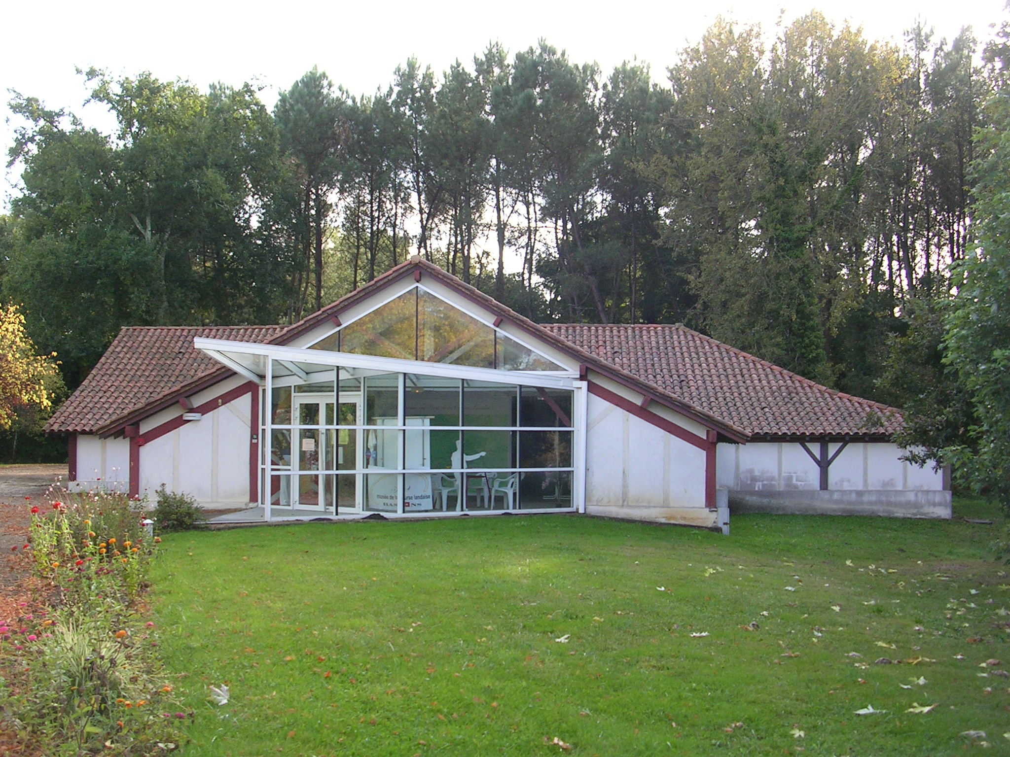 Musée de la course landaise à Bascons, dans le département français des Landes